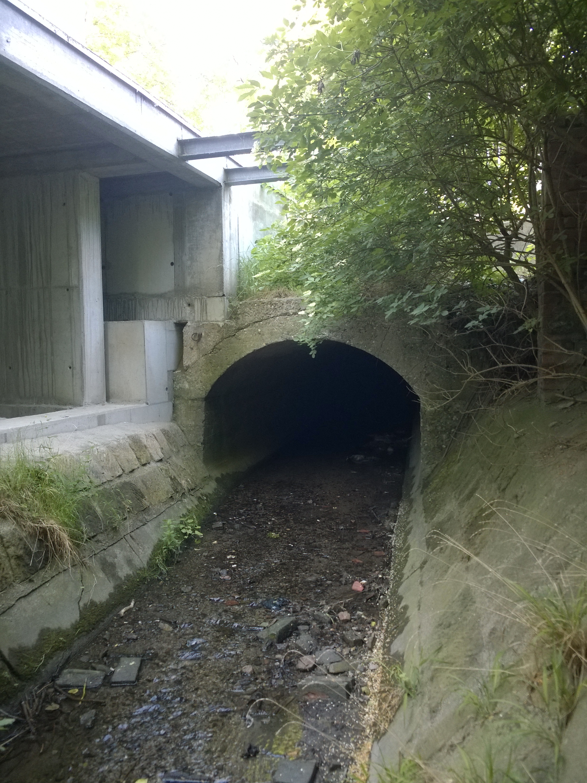 Austritt des Leubnitzbaches aus der Verrohrung unter der Dohnaer Straße in den Koitschgraben